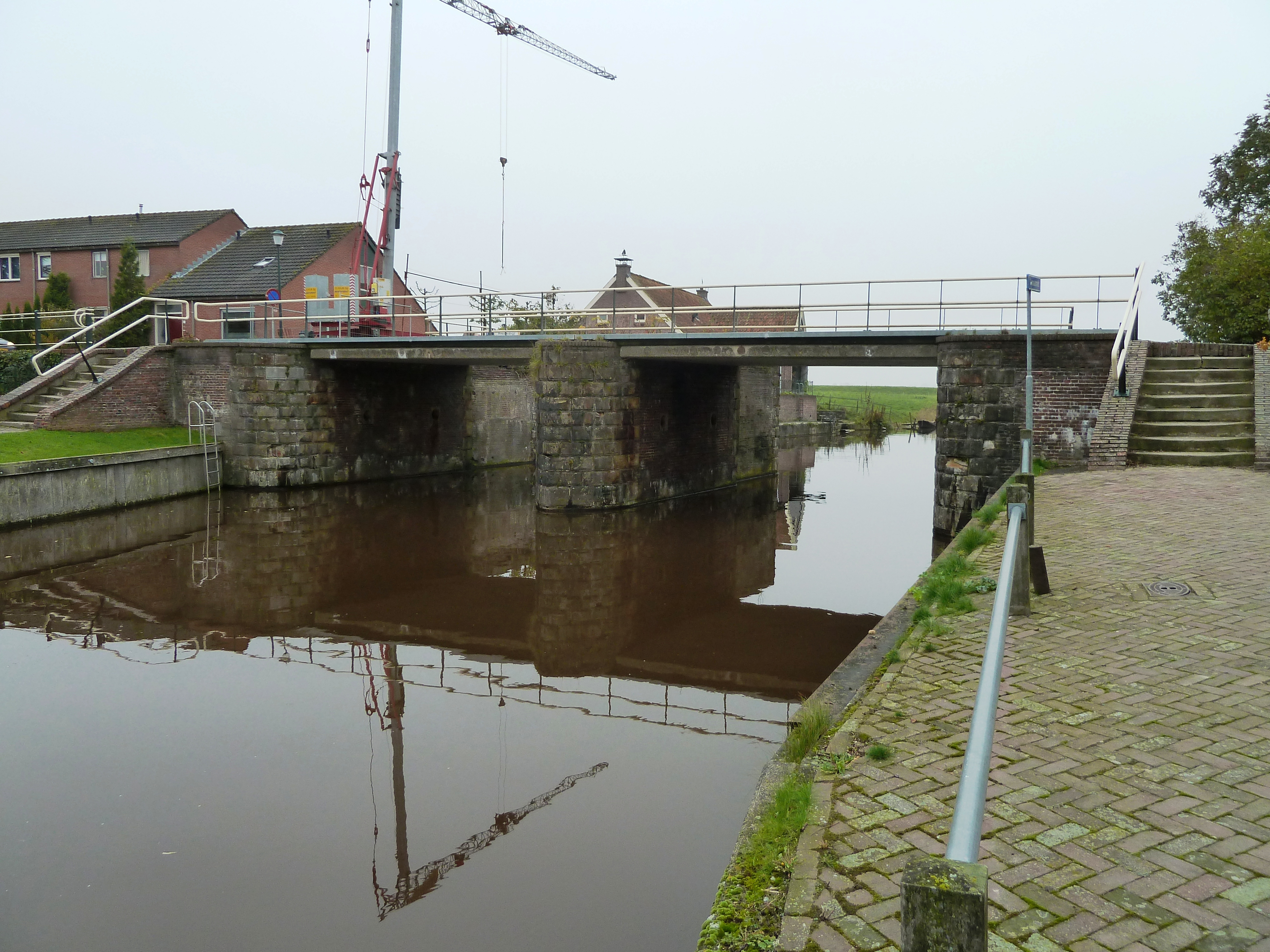 Vroegere sluis (zijl) van Kommerzijl. De kraan is in gebruik bij de recreatiewoning bij de sluis.